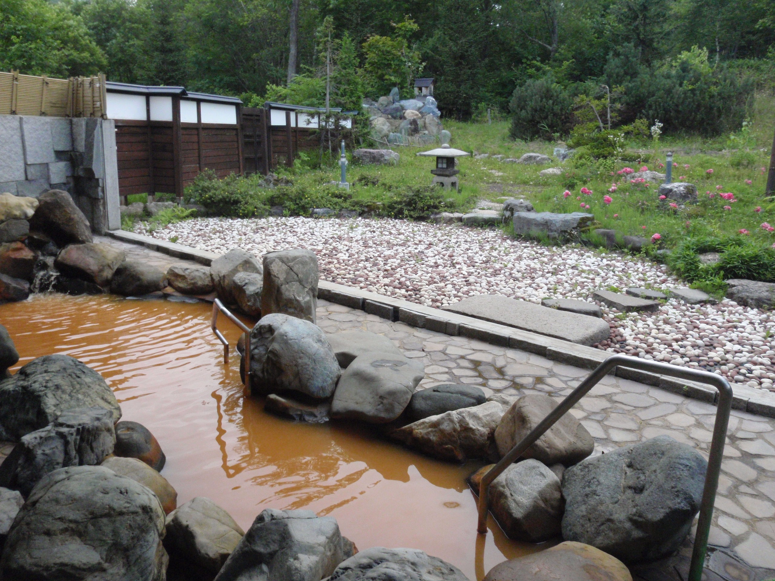 せいわ温泉ルオントの露天風呂